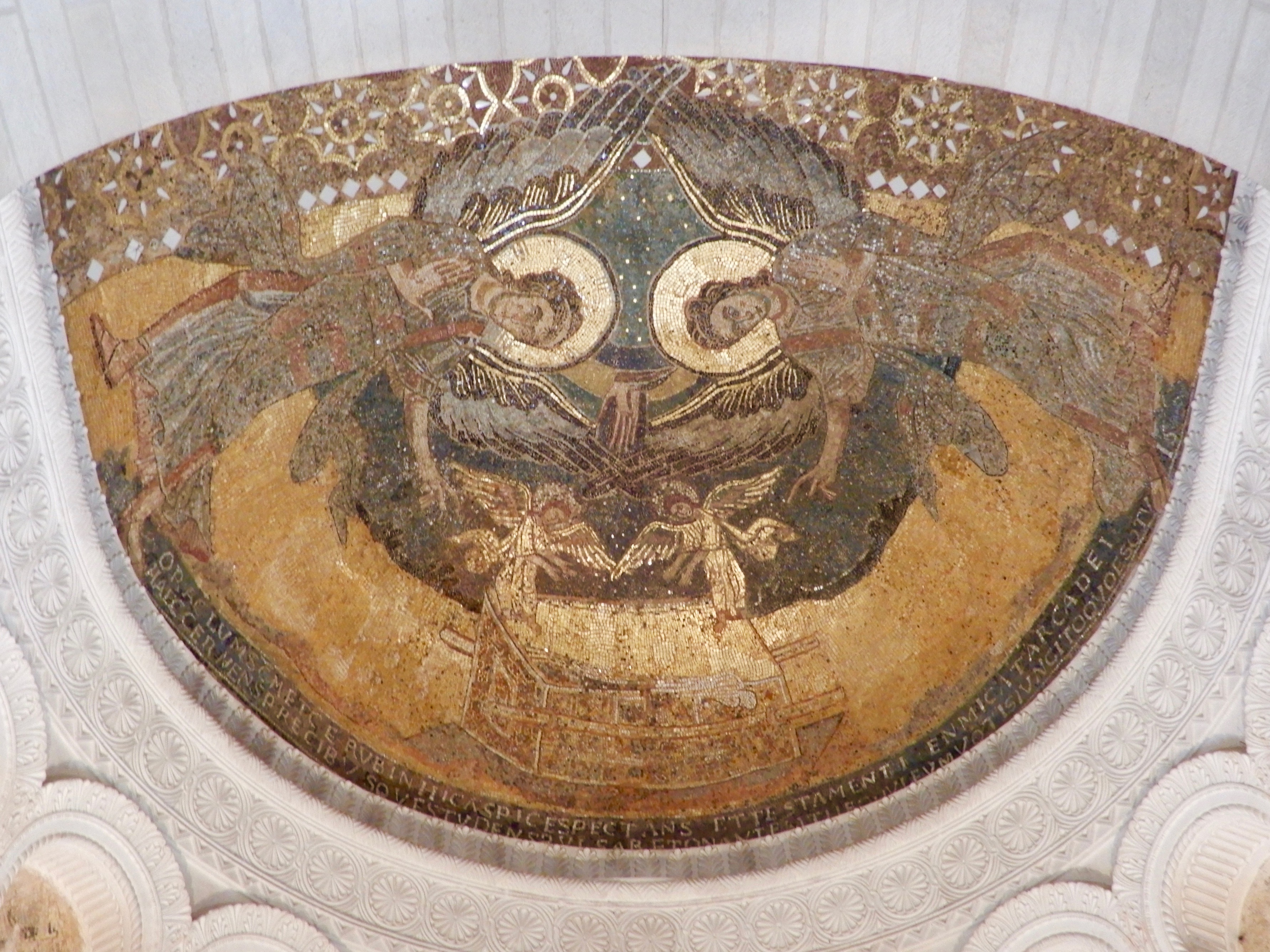 Mosaik eines Künstlers aus Ravenna in der Ostabside von Germigny-des-Prés aus 130.000 Glassteinen